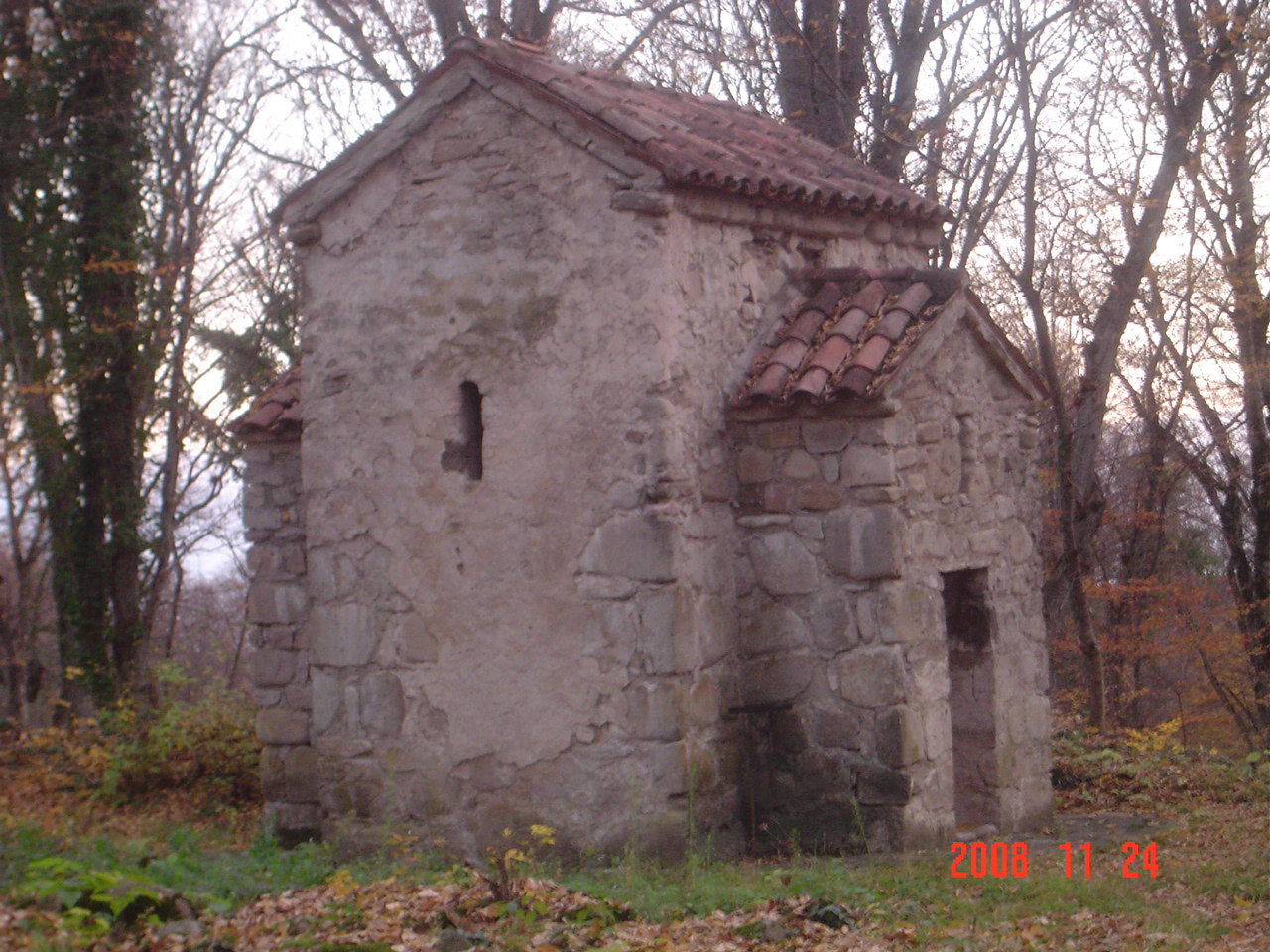 Маленькая Базилика им. св. марины